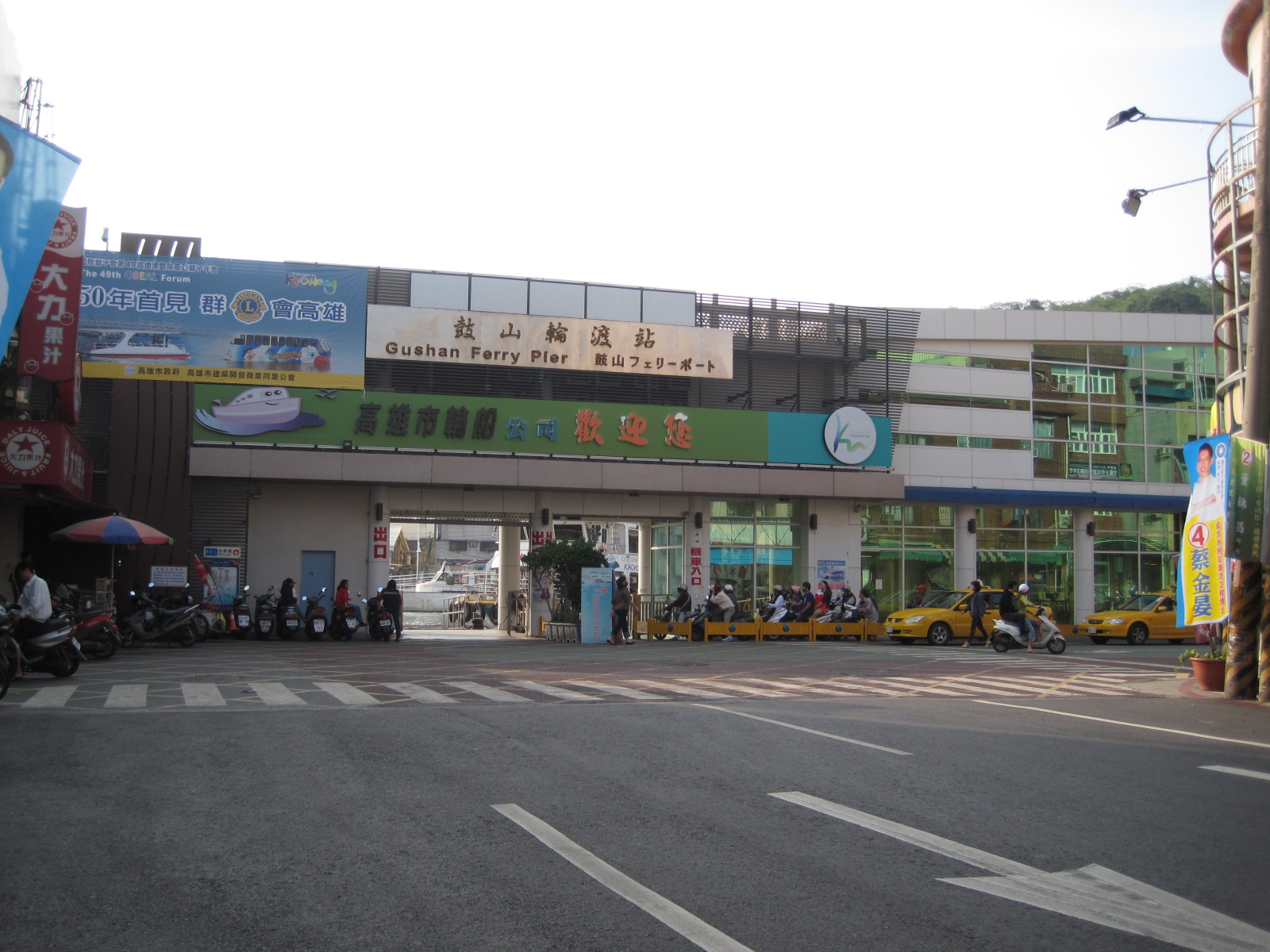 鼓山輪渡站2010年之外觀